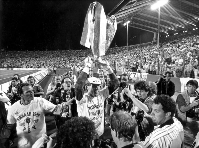 Voetbal, Europacup (EC) I ,Seizoen 1987/1988, Finale PSV-Benfica (0-0) PSV wint na strafschoppen 6-5. Willy van de Kerkhof (links) en Hans van Breukelen (die de beslissende strafschop stopte) lopen een ereronde. Gottlieb Daimler Stadion Stuttgart 25 mei 1988.